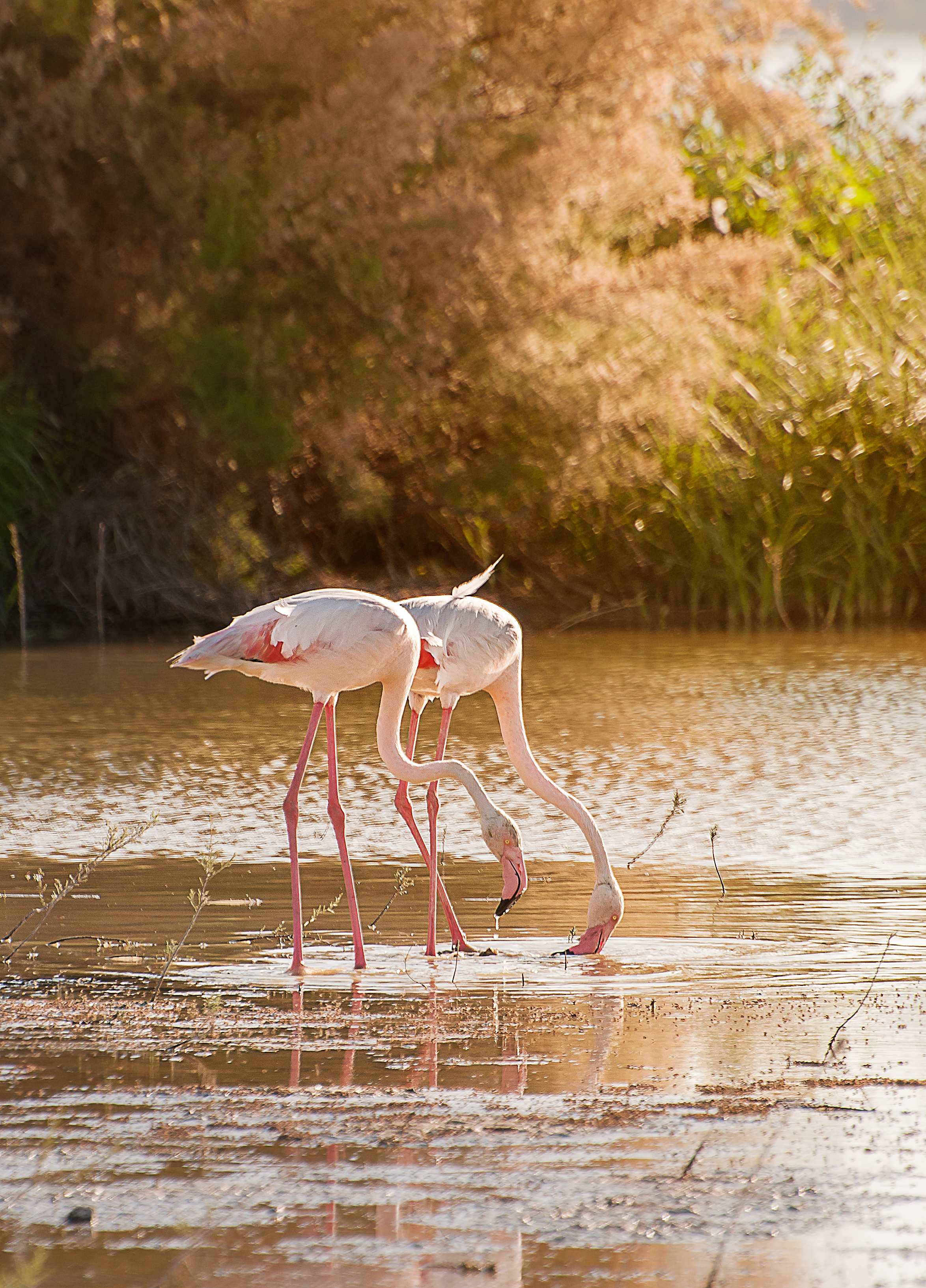 Flamencos al atardecer en la Laguna de Fuentedepiedra This is a photography of a Special Area of Conservation in Spain with the ID: ES0000033. Natura2000 entry, EEA entry